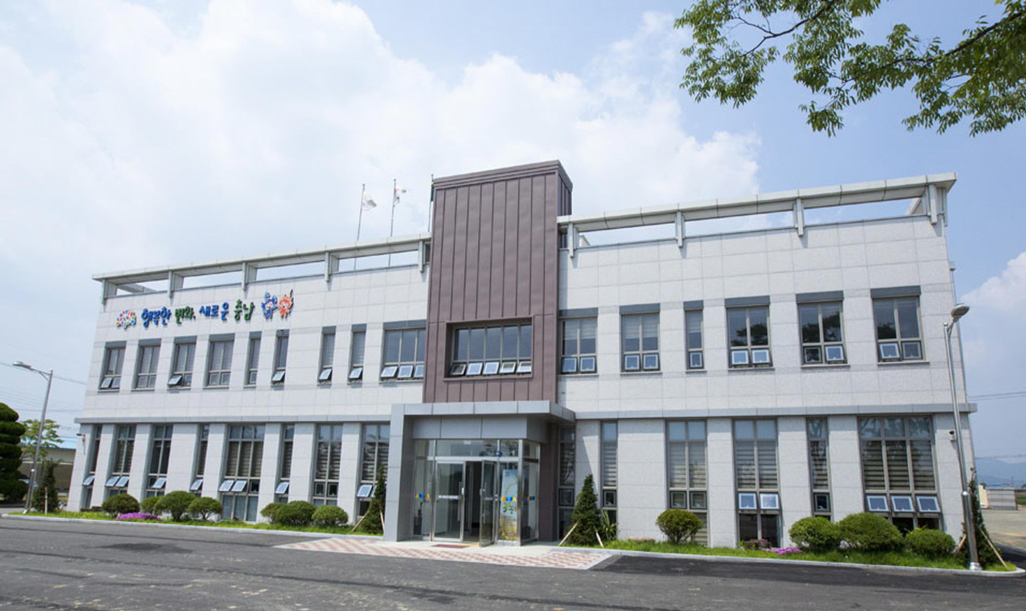 종자관리소 논산분소